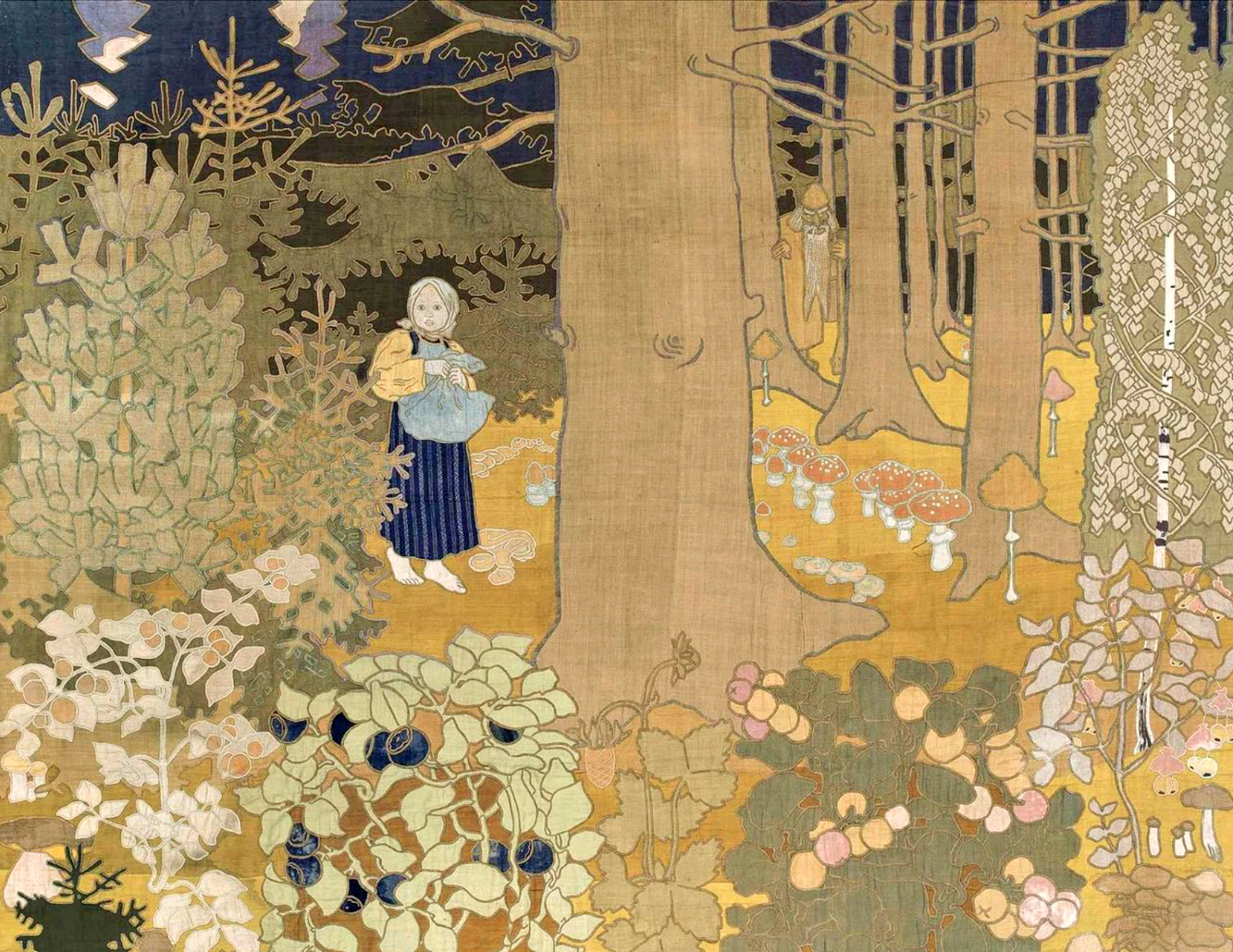 МАРИЯ ЯКУНЧИКОВА. Настенное лоскутное панно из хлопка, льна и шерсти по эскизу художницы. 1899